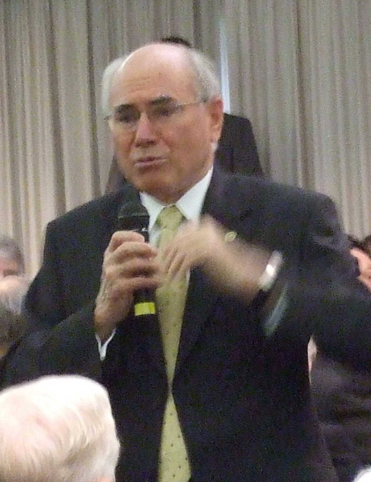 John Howard